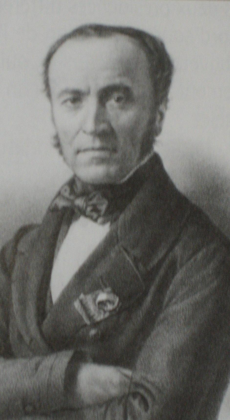 Gravure représentant Jean-Hubert Houël (1802-1889)